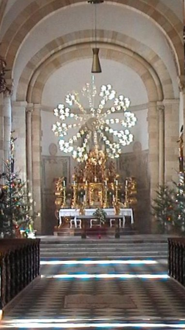 eigen foto van Besednjak (2 jan 2004), onder GFDL vrijgegeven.